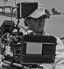 Rodaje Sec. Sahara Meeting Steven